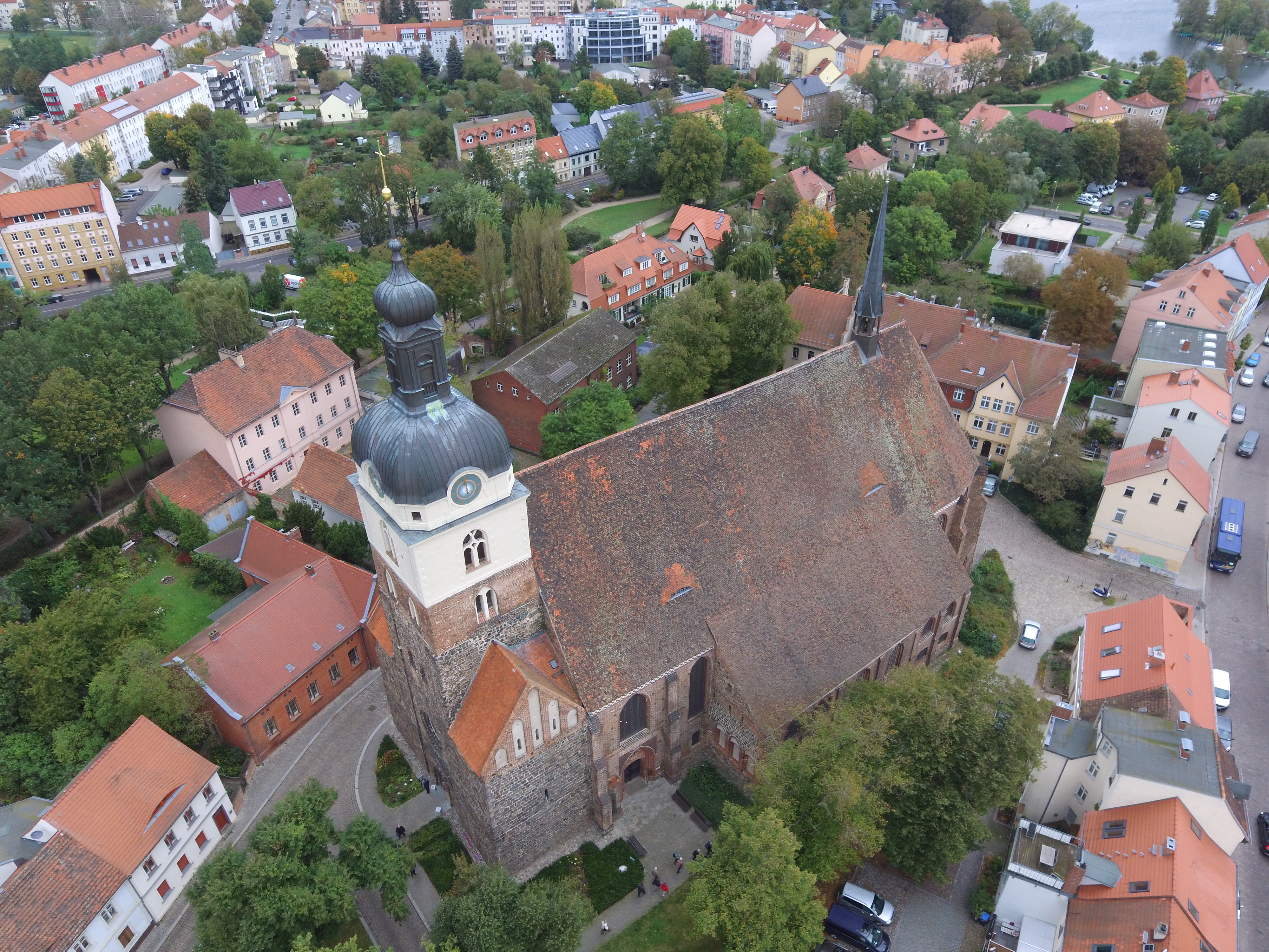 Luftbild der KIrche Sankt Gotthardt in Brandenburg